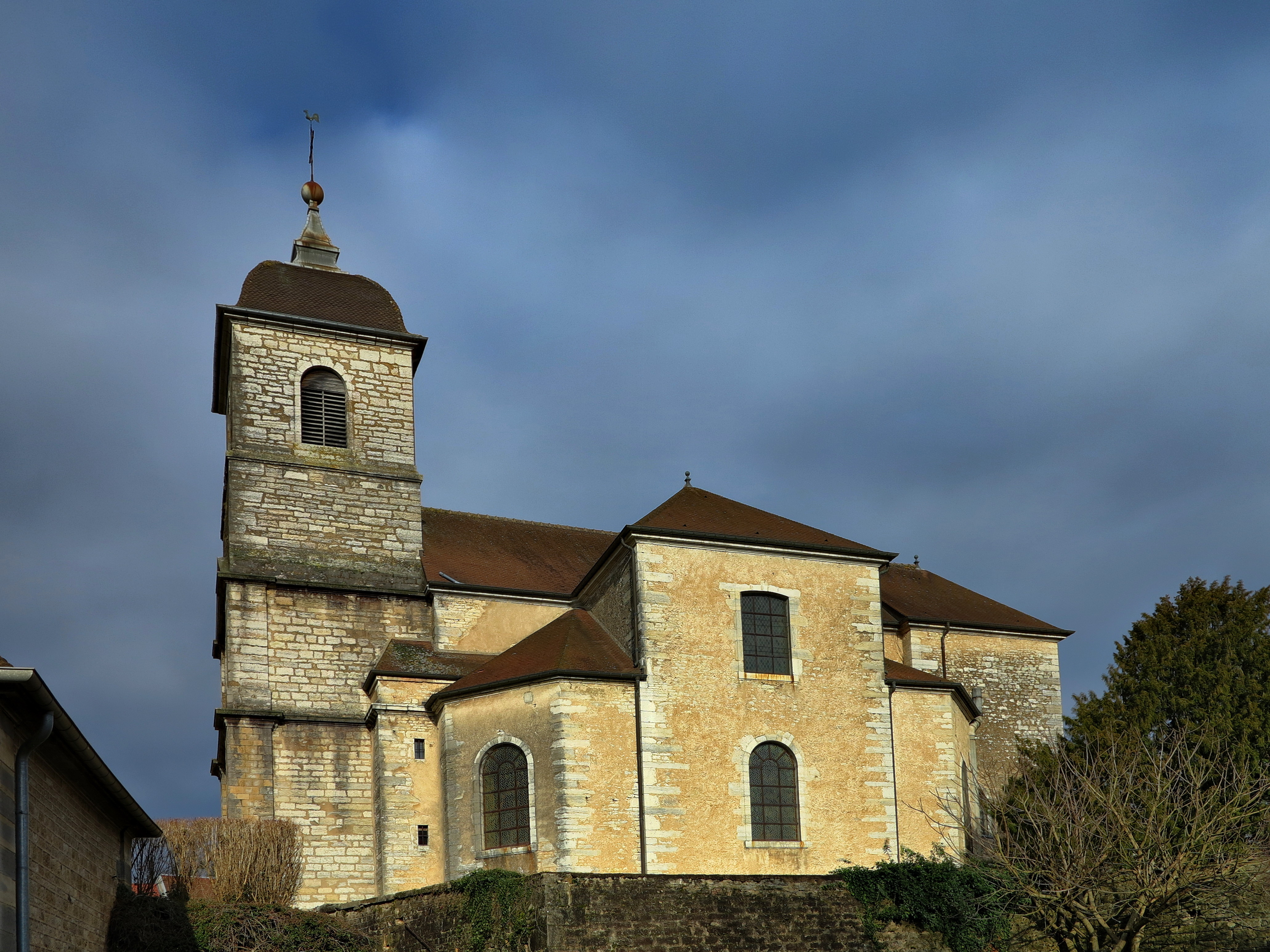 Inscrit aux monuments historiques sous le numéro PA00102297